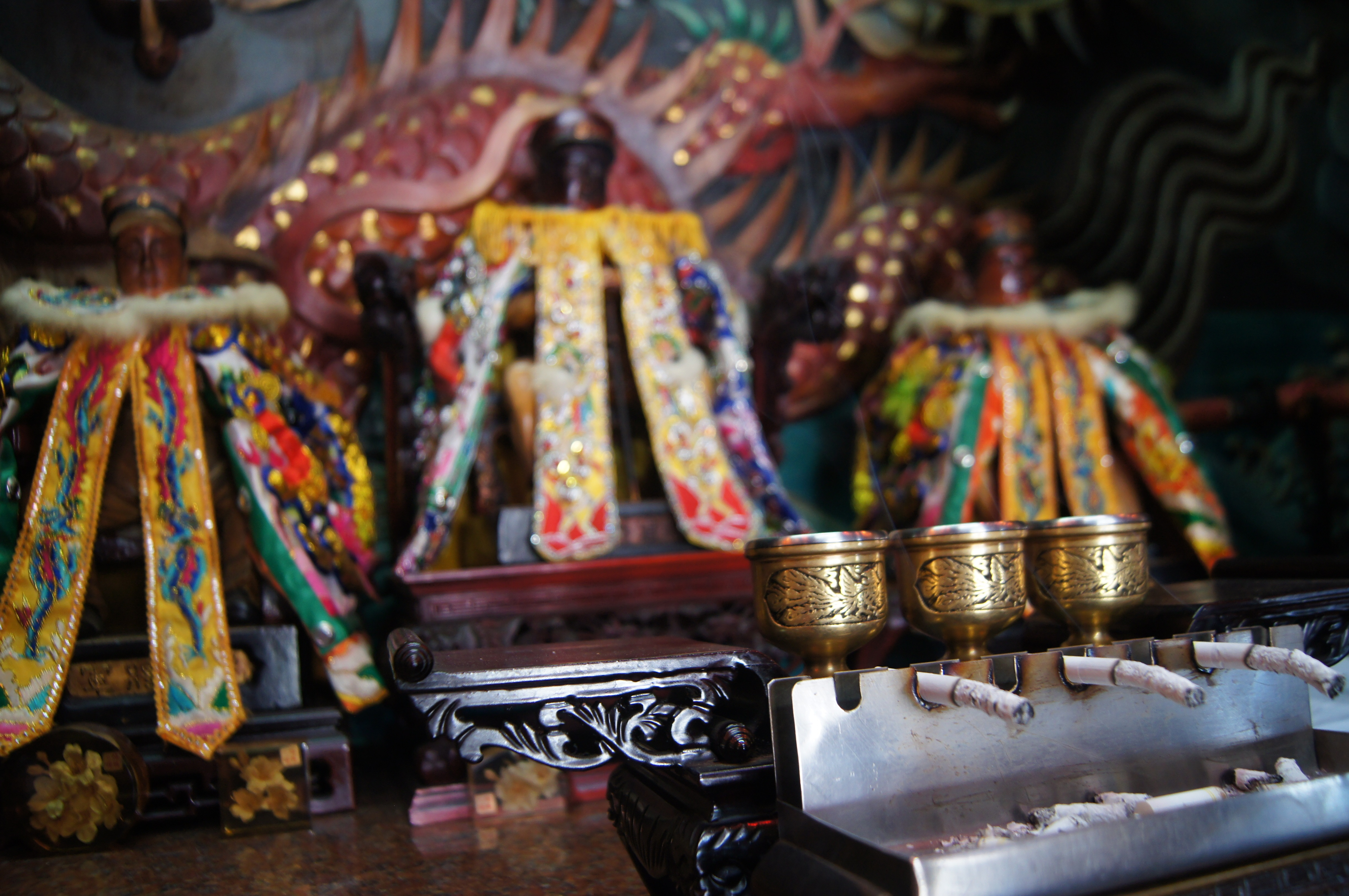 飛虎将軍廟神像。煙草を奉納している